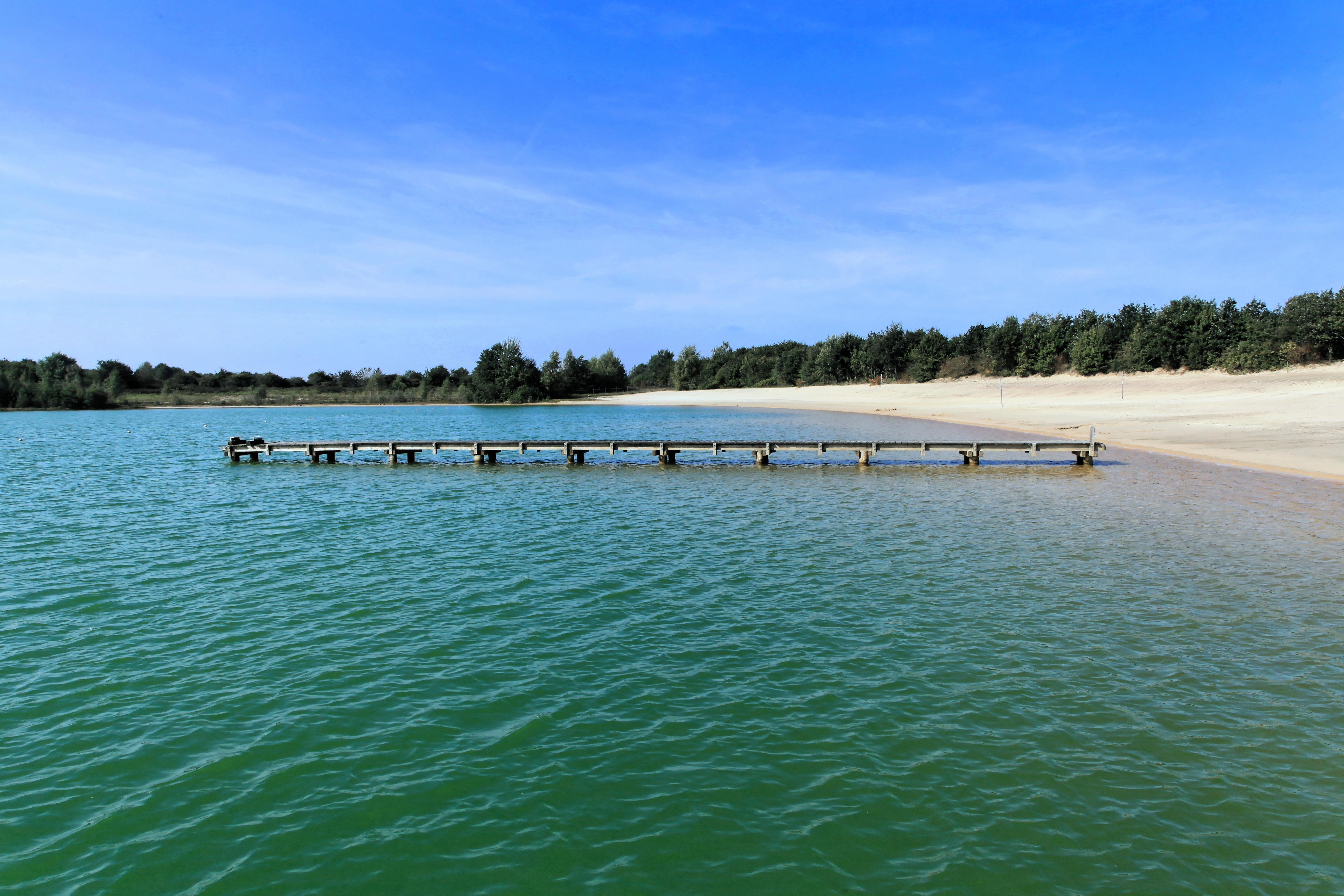 Badestrand Herzogsee, Ossenweg in Walchum